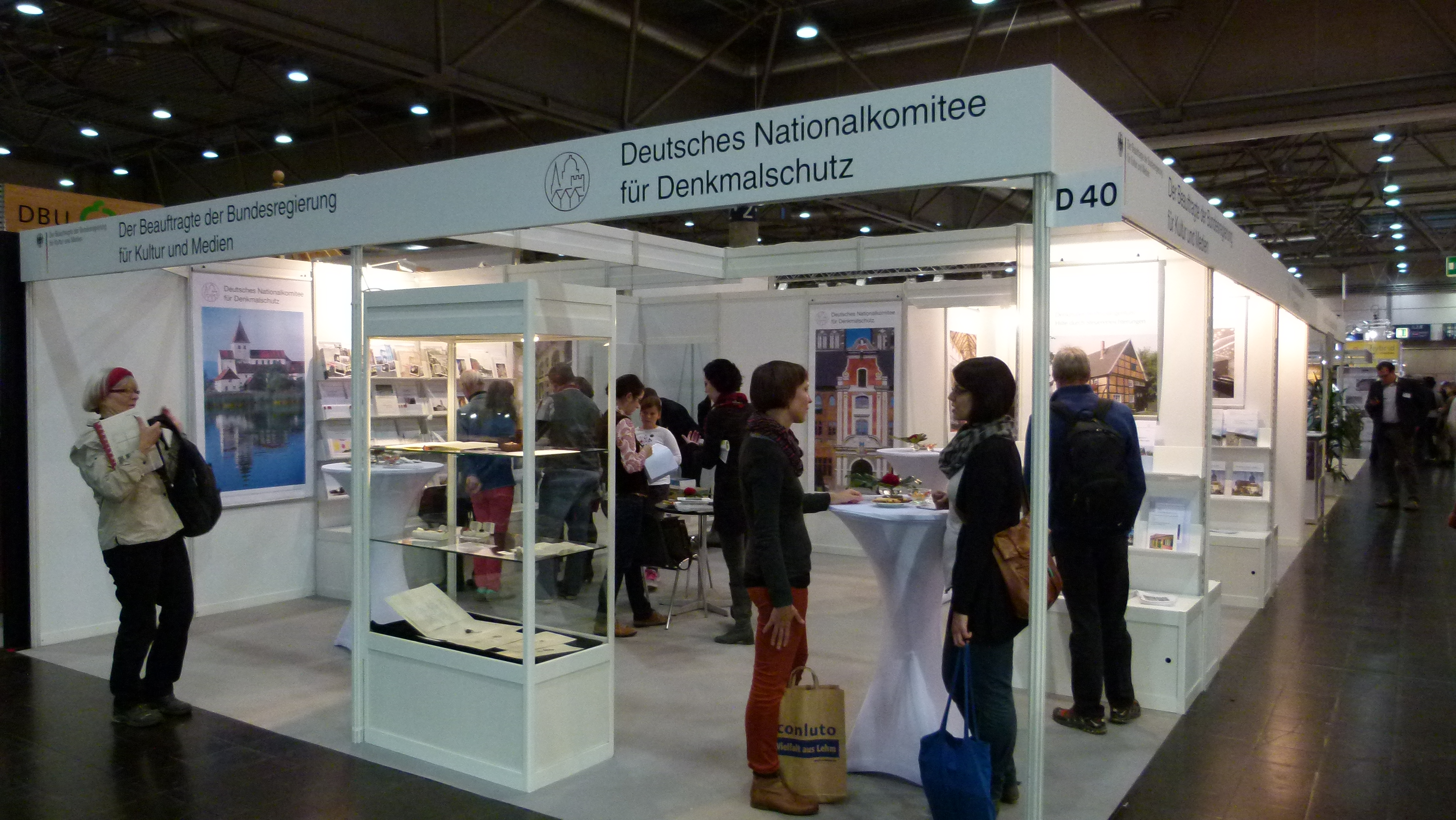 Europäische Denkmal-Messe in Leipzig, 22.-24. November 2012